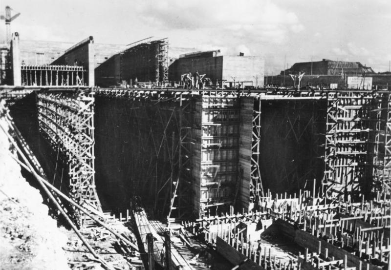 Die Riesenbunker am Atlantik In einer gewaltigen Arbeitssymphonie entstanden an der Atlantikküste die riesigen Bunker-Bauten, die unseren U-Booten bombensichere Stützpunkte bieten. PK-Aufnahme: Kriegsberichter Tölle 6495-42 Okt. 1942